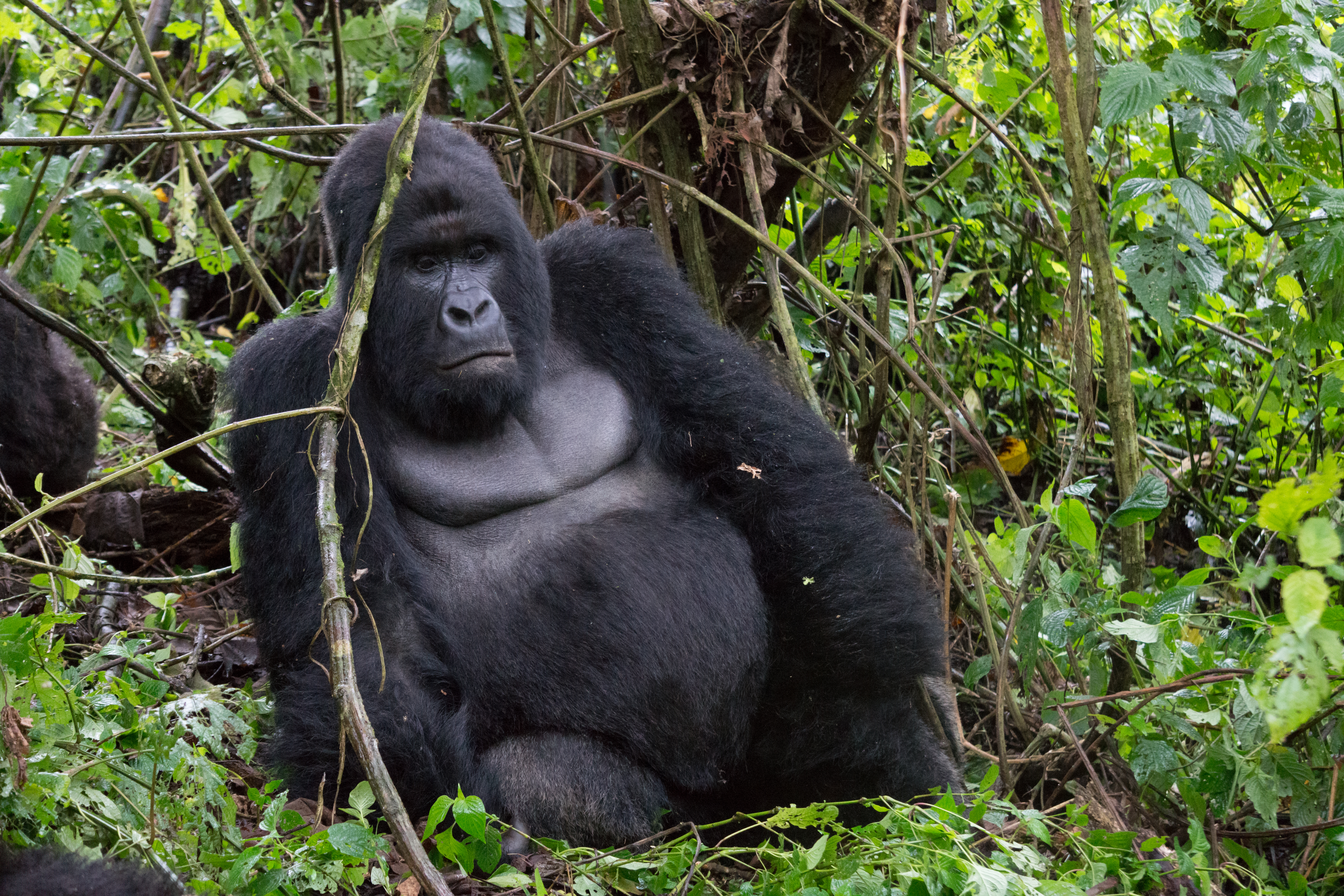 Virunga National Park